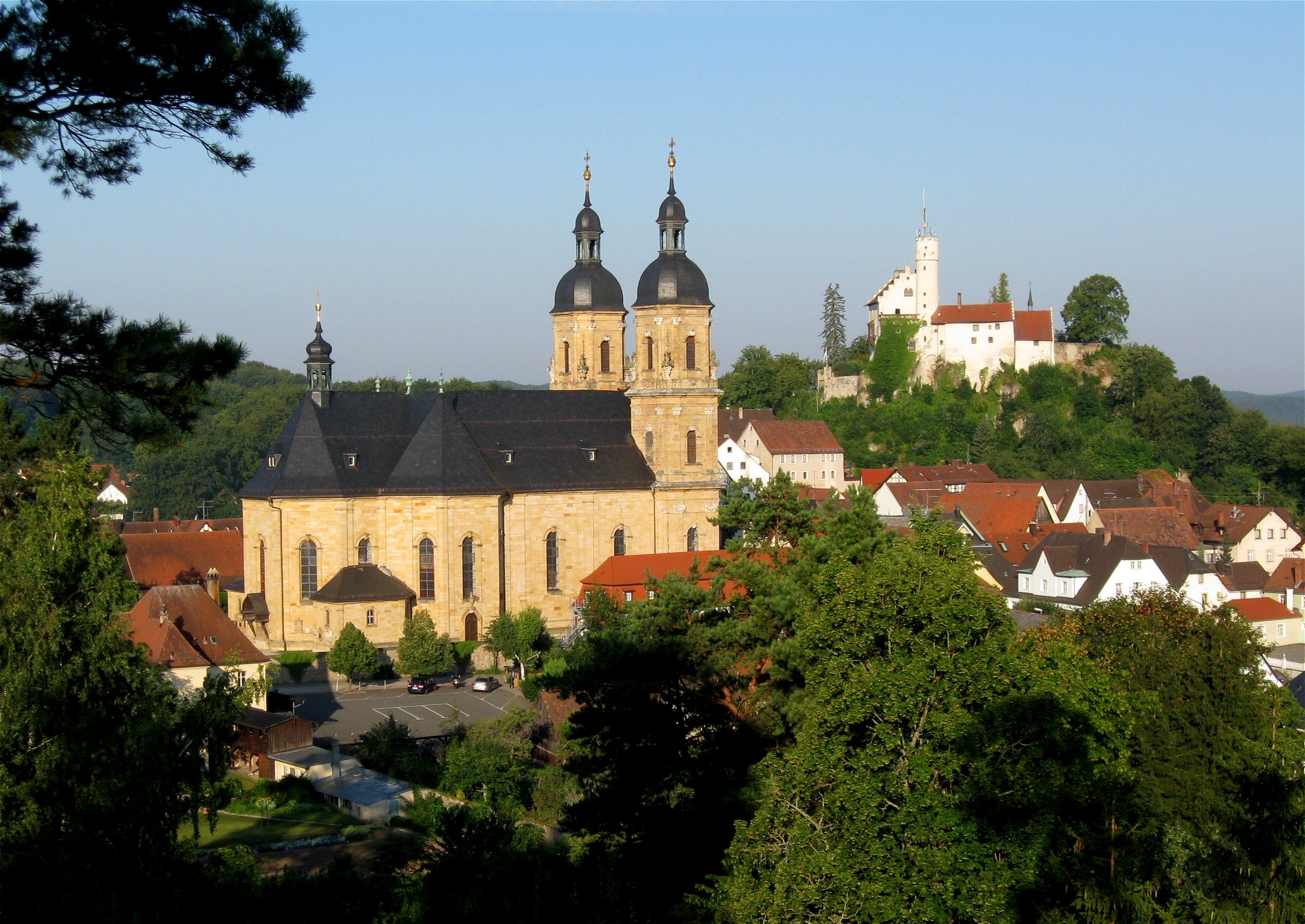 Burg Gößweinstein und Dreifaltigkeitsbasilika in Gößweinstein